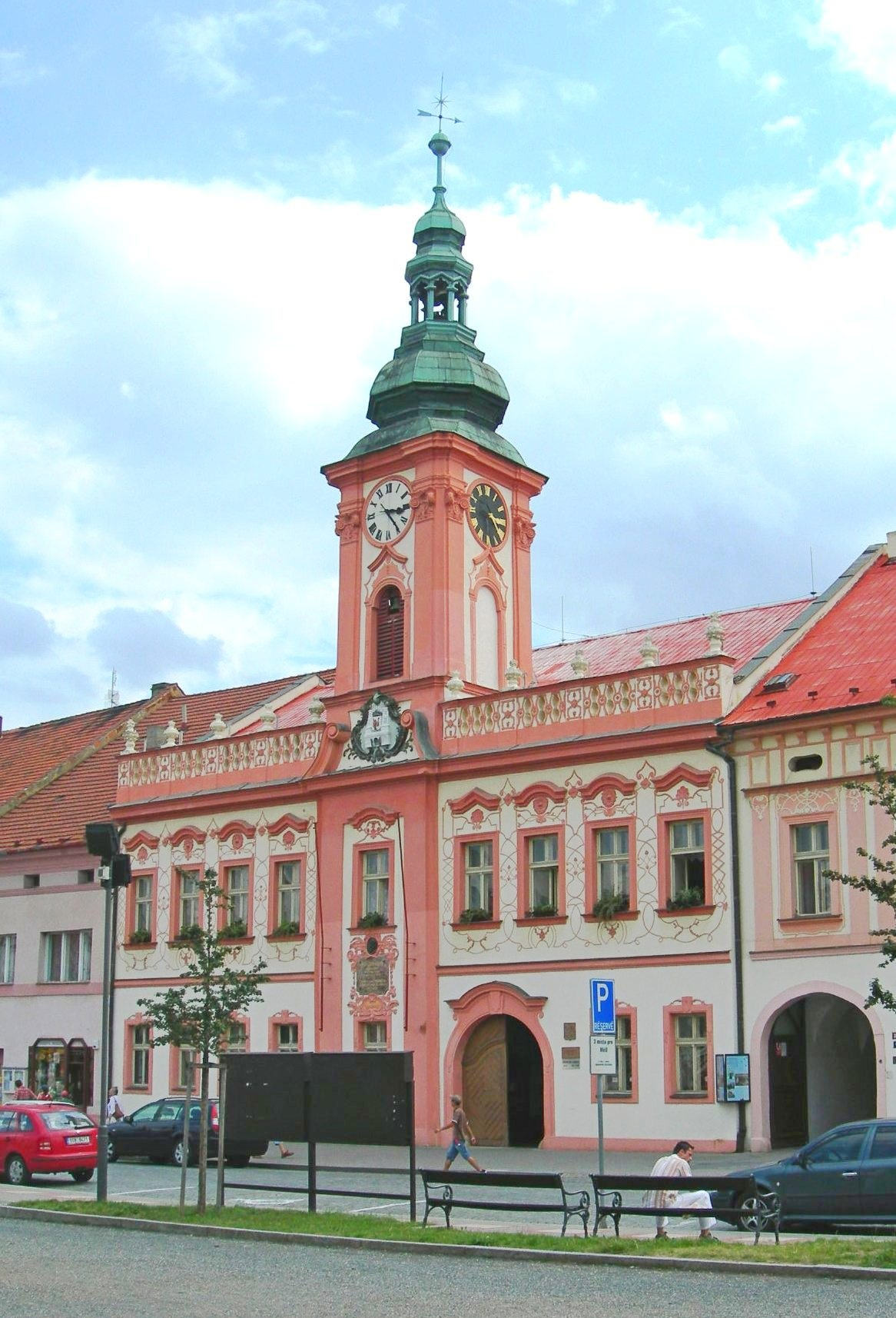 Rakovník, City hall)